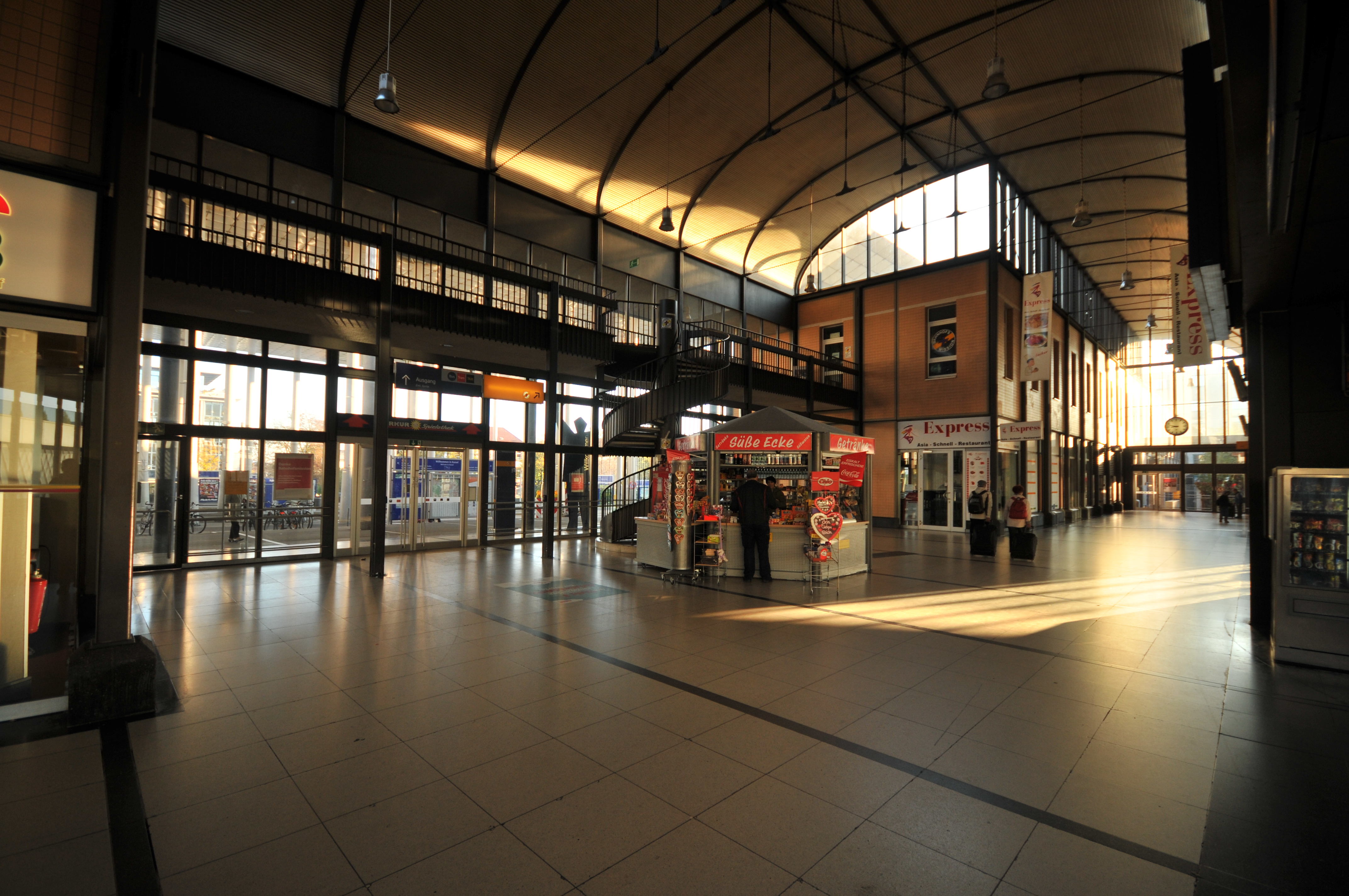 Kassel Bahnhof Wilhelmshöhe